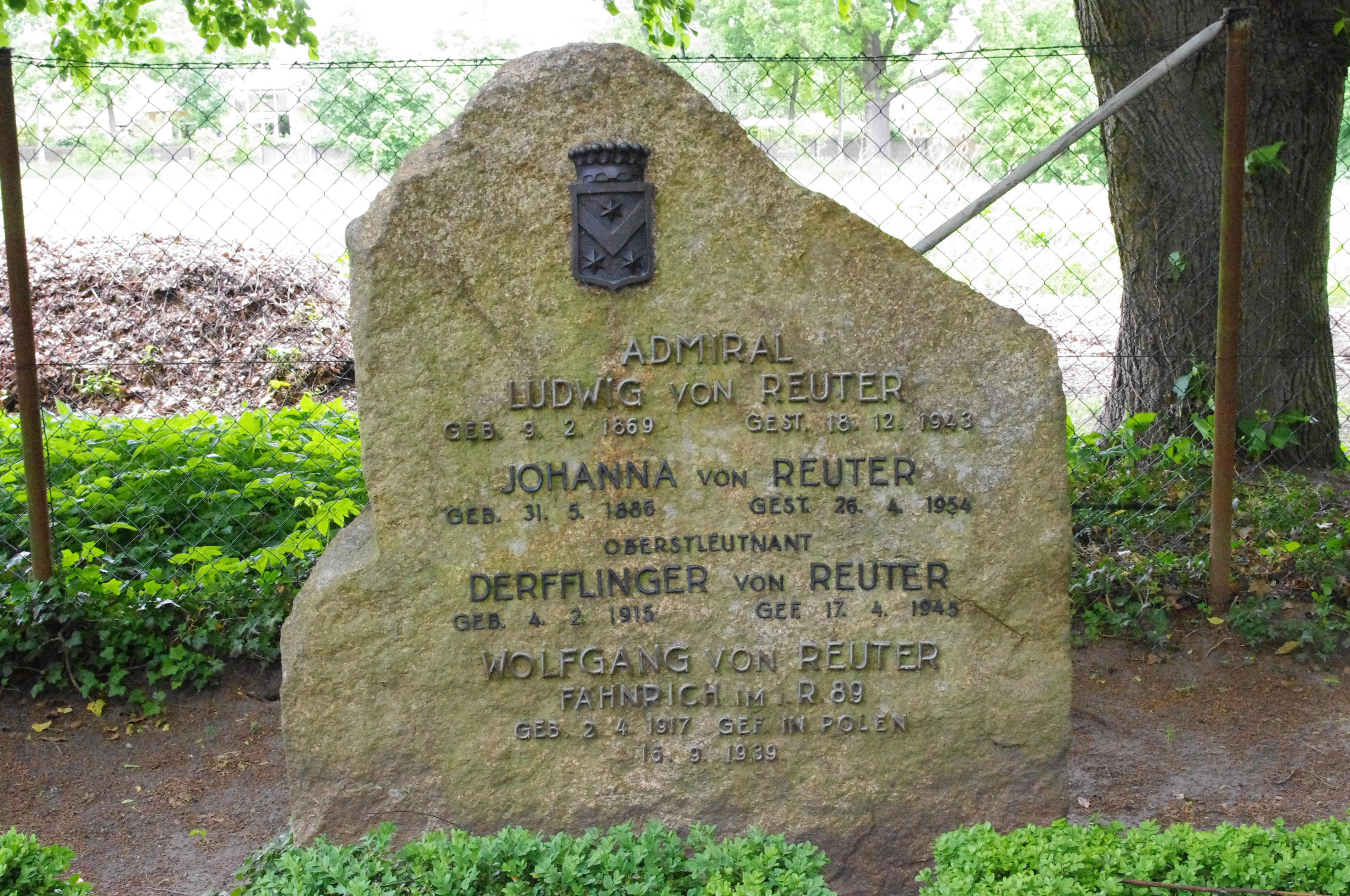 Grabstein Ludwig von Reuter (1869-1943)